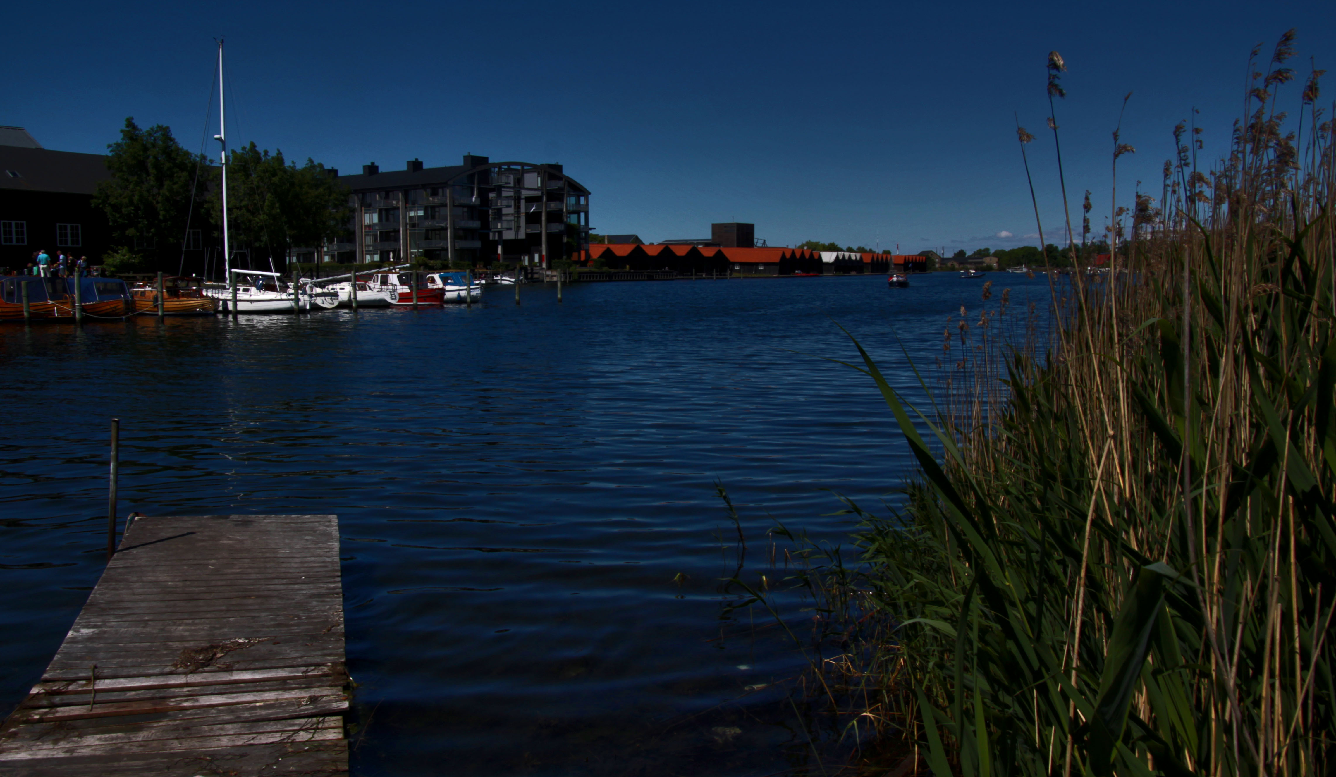 København / Copenhagen. Ved Erdkehlgraven.